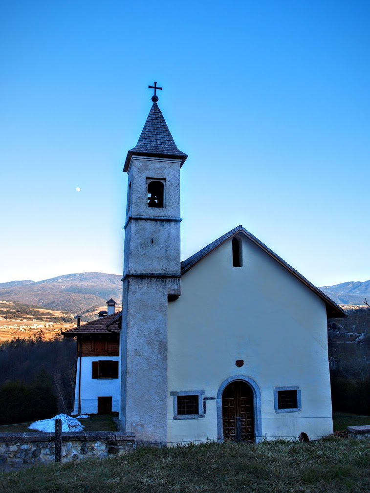 Cles (frazione Dres) kostel svatého Tomáše / Chiesa di San Tommaso